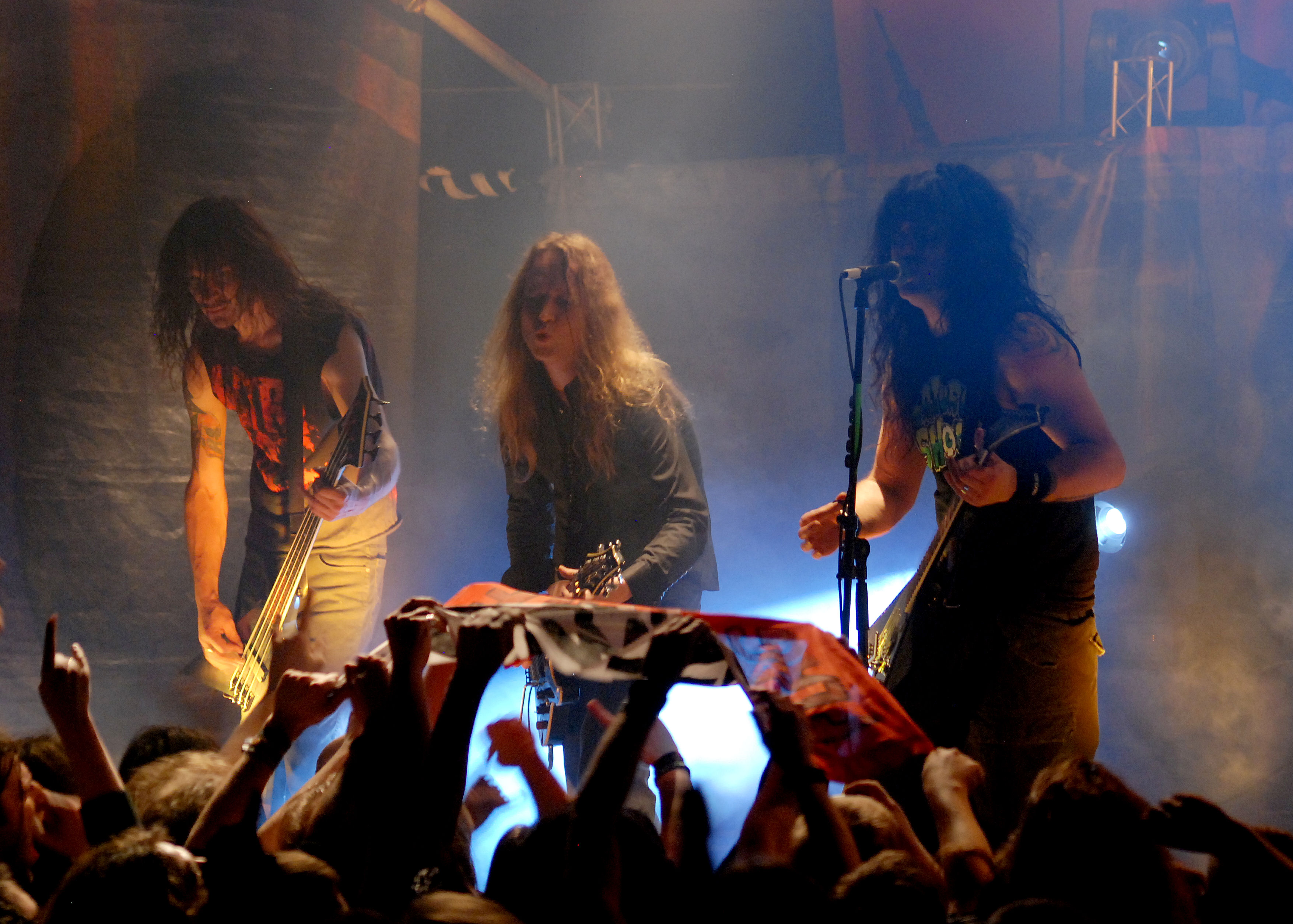 Kreator podczas koncertu w Klubie Studio w Krakowie